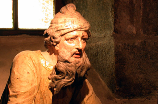 Description : Saint-Thégonnec (29) - Mise au tombeau, situé dans l'ossuaire de l'enclos paroissial - Nicodème Date : juillet 2004 Auteur : Ifernyen Source : Archives personnelles Statut : GFDL Ifernyen Catégorie:Représentation de Jésus-Christ dans la sculpture Catégorie:Représentation de la mise au tombeau